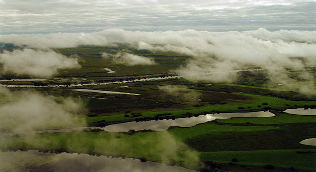 Панинский заказник, Александровский район This image is related to the protected area of Russia number 7010006